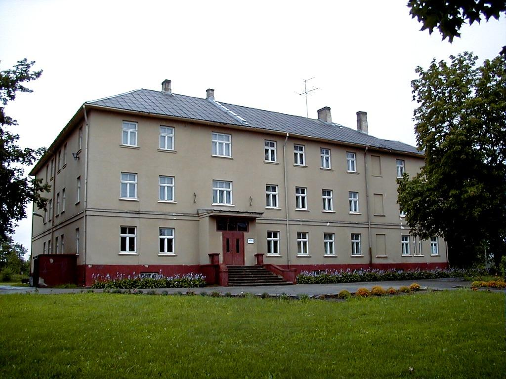 Birzgales skola. 2000-07-15